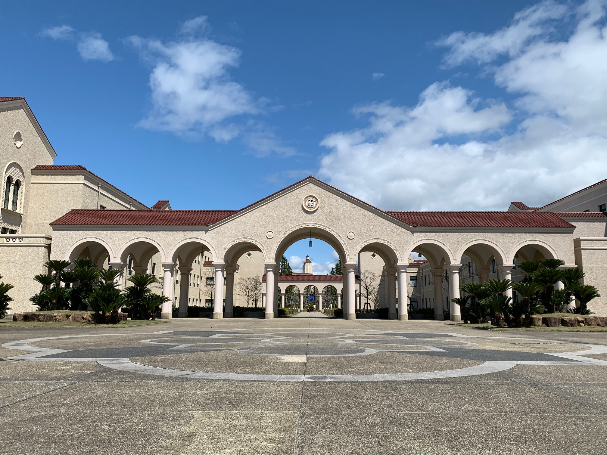 快晴の神戸三田キャンパス回廊 2020年4月撮影